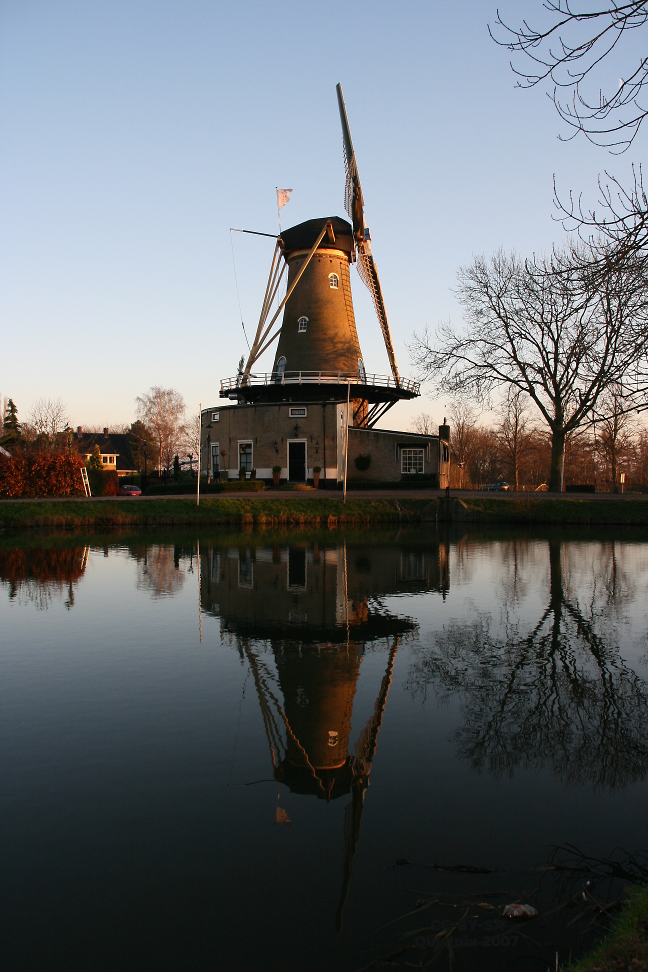 Geervliet: Bernisse Molen vanaf N in de late middag